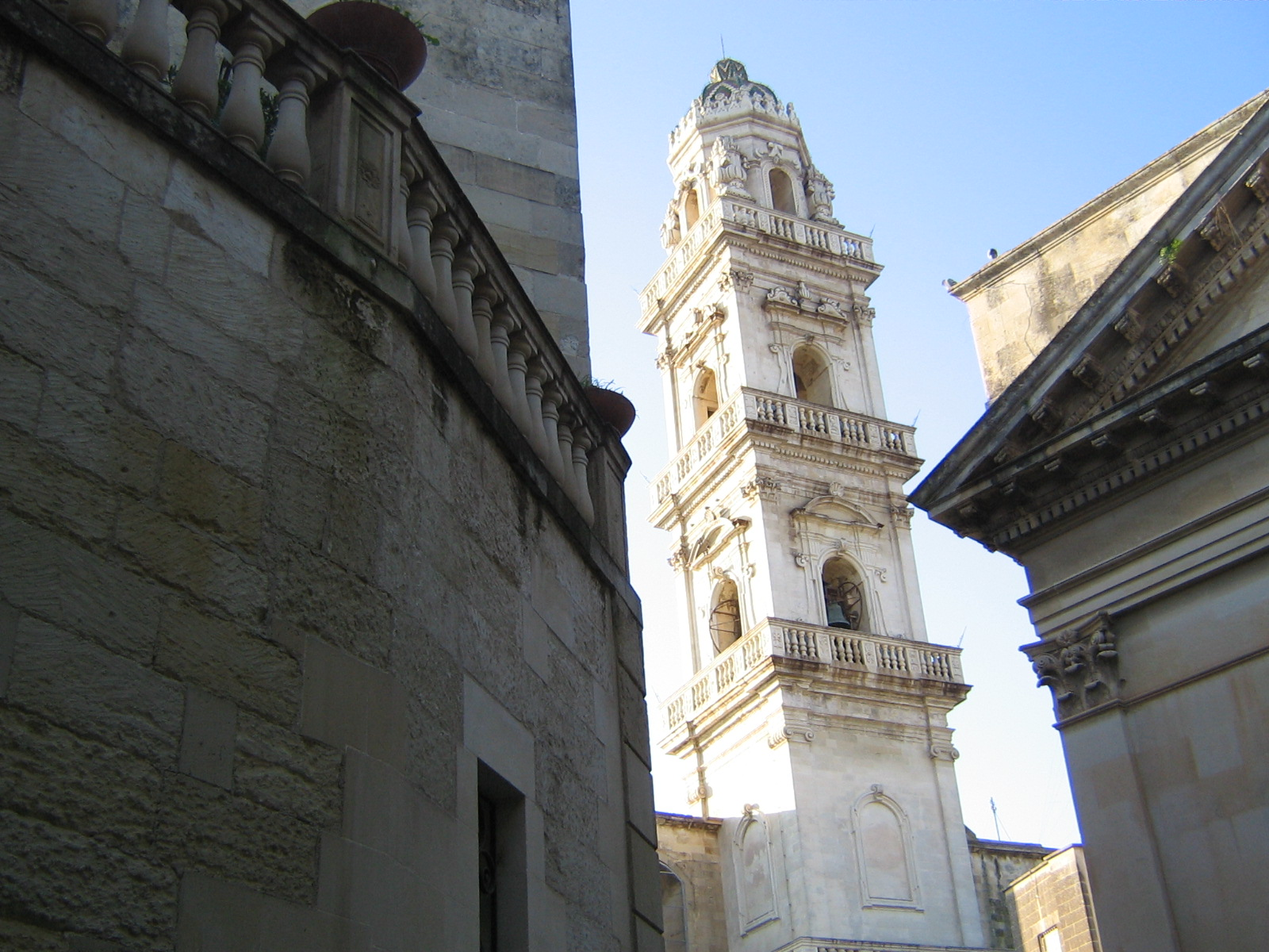 Campanile del Duomo di Maglie.